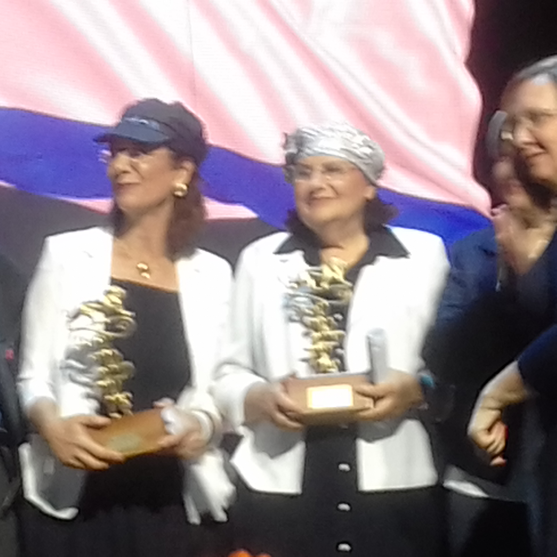 נדיה מטר ויהודית קצובר אוחזות ב"אות פרס מוסקוביץ לציונות" לשנת 2019